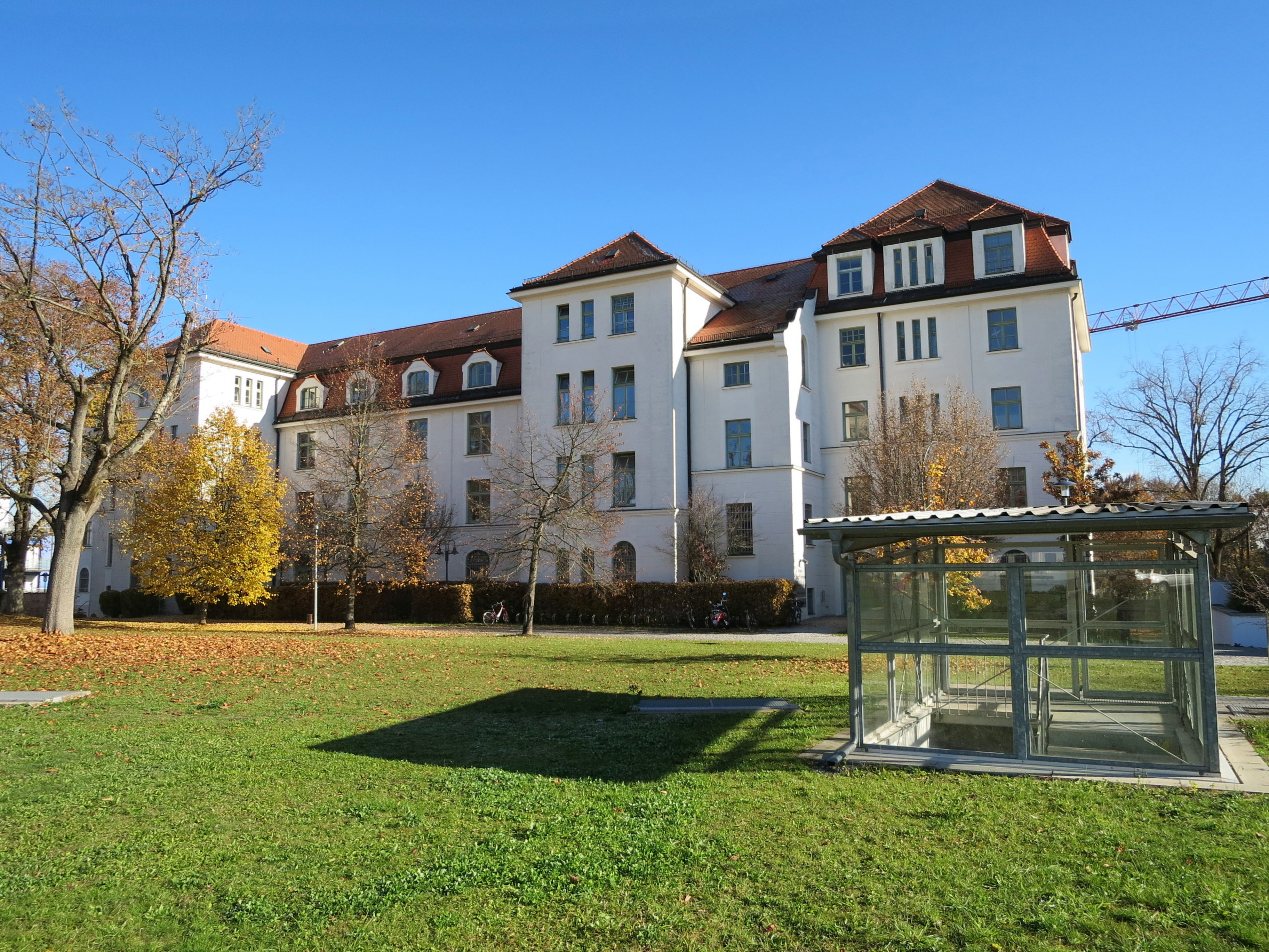 Ehemalige Vimy-Kaserne 1904-06 für das 1. Königlich Bayerisches Jägerbataillon errichtet, mit Ergänzungsbau von 1914/15; In der Tradition barocker Schlossanlagen u-förmig um Exerzierplatz angelegt, hinsichtlich Baumassengliederung, Dachausbildungen und Fassadenstrukturen aufeinander bezogene Baugruppe mit Straßenfronten nach Süden (Vimystraße) und Osten (Pallottinerstraße) sowie weiteren, nach Nordwesten (Prinz-Ludwig-Straße) ausgreifenden Bauten; Diese Kaserne in Freising ist in eine Wohnanlage umgewandelt worden.